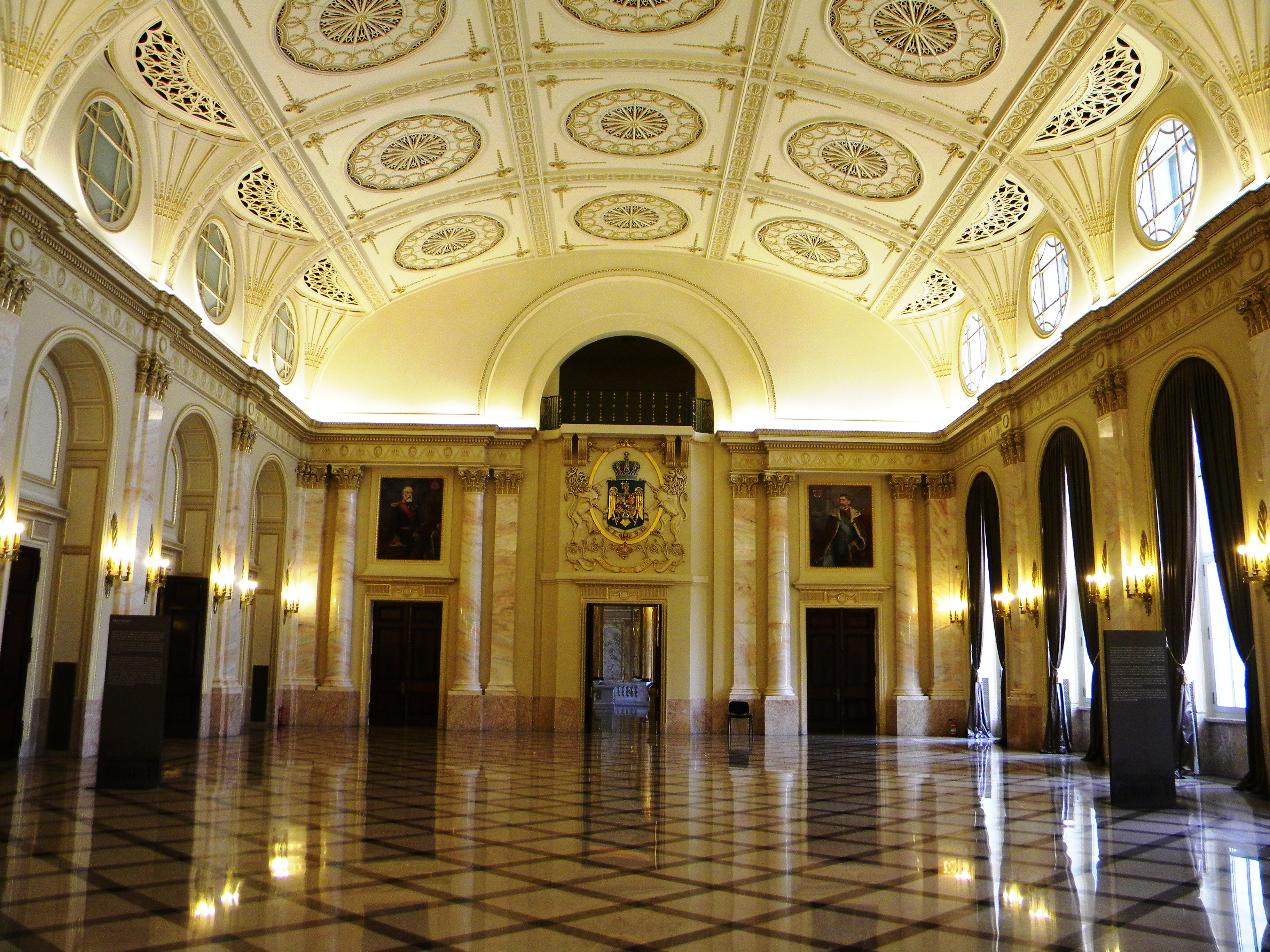 Bucuresti, Romania, Palatul Regal (Muzeul National de Arta al Romaniei - Pavilionul Sala Tronului - Sala Tronului interior 1 ); B-II-m-A-19856